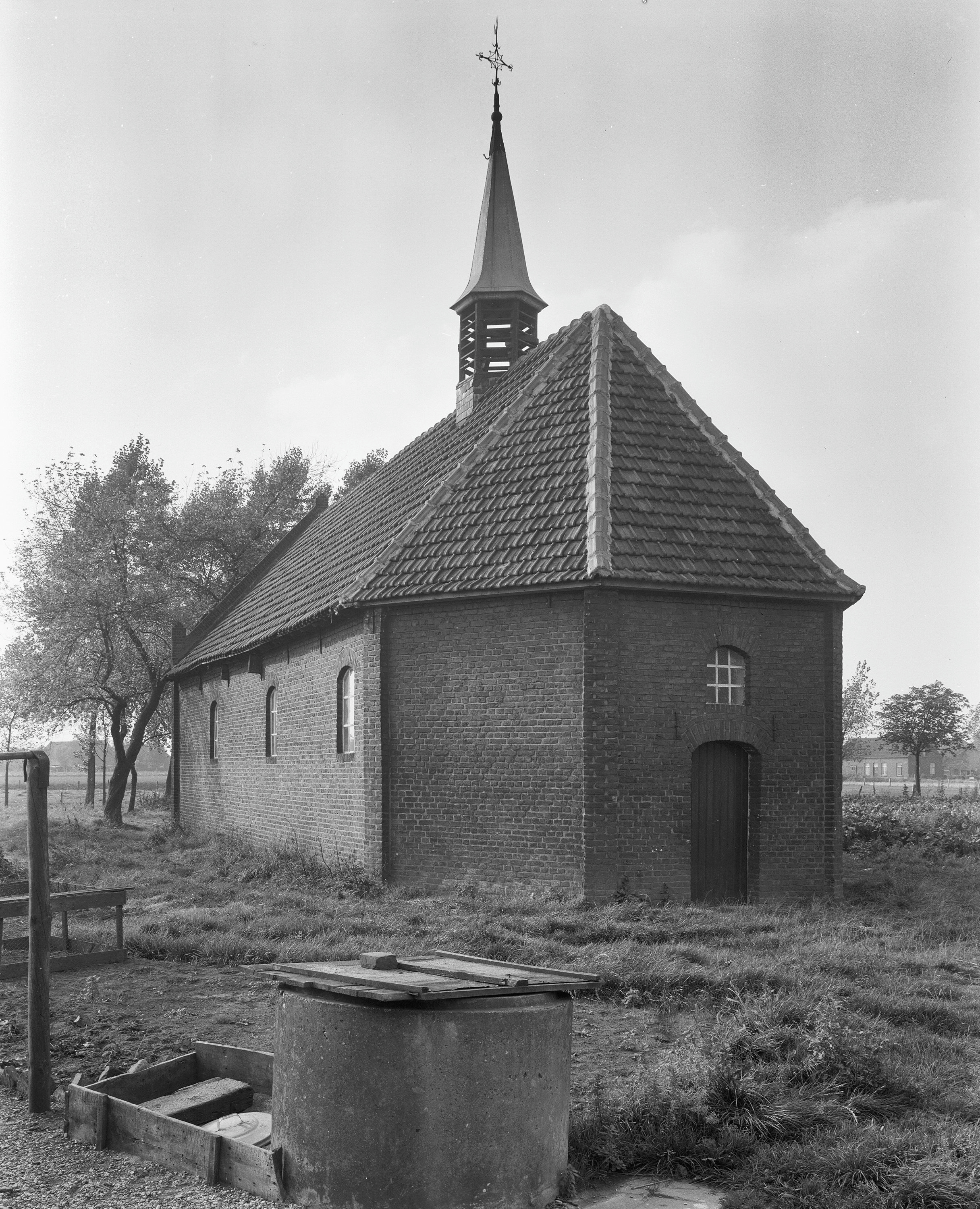 Sint Oda Kapel: exterieur naar het noord-westen